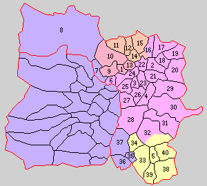 福島県伊達郡の町村。